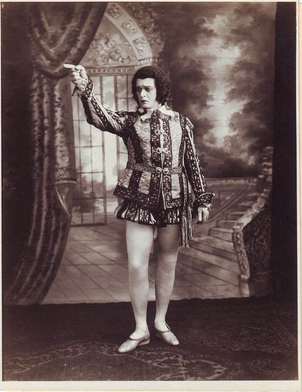 Juozas Babravičius (1882 m. kovo 21 d. Šelviuose, Vilkaviškio valsčius – 1957 m. balandžio 3 d. Kaune) – Lietuvos dainininkas (tenoras), pedagogas. Fotografijoje-Hercogo vaidmuo Džiuzepės Verdžio operoje "Rigoletas".